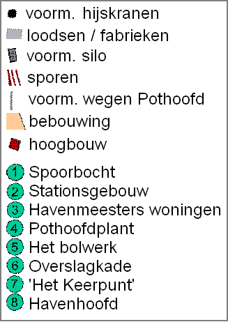 Eigen makelij TC. Nijeholt